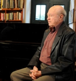 José Murilo de Carvalho (Andrelândia MG, 8 de setembro de 1939) é um cientista político e historiador brasileiro, membro desde 2004 da Academia Brasileira de Letras. Junto com o jurista e professor Celso Lafer, José Murilo é o único historiador brasileiro a ser membro dessa Academia e também da Academia Brasileira de Ciências.